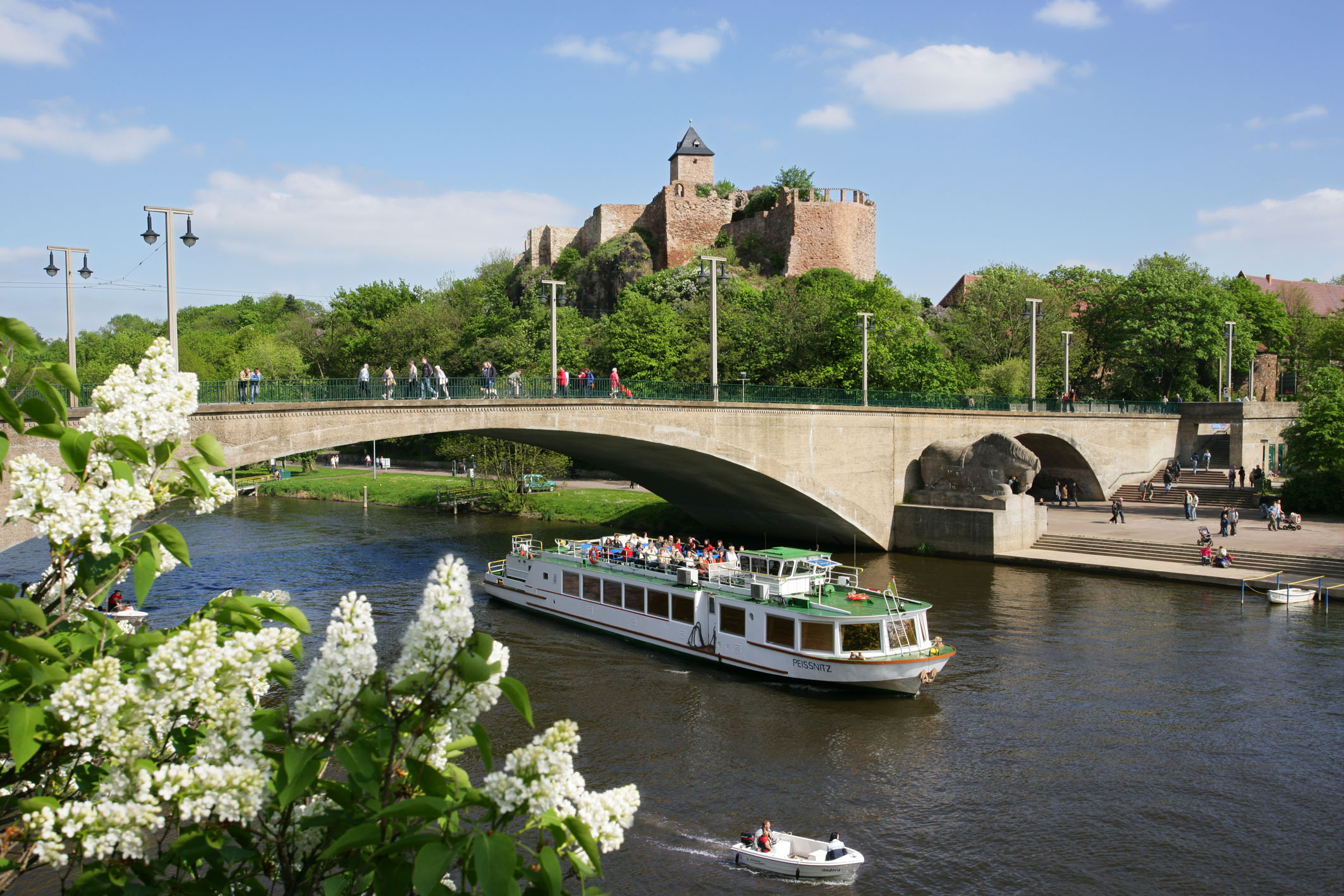 Die Burg Giebichenstein mit Kröllwitzer Brücke und Fahrgastschiff Peissnitz, Binnenfahrgastschiff (BiFa) Typ III